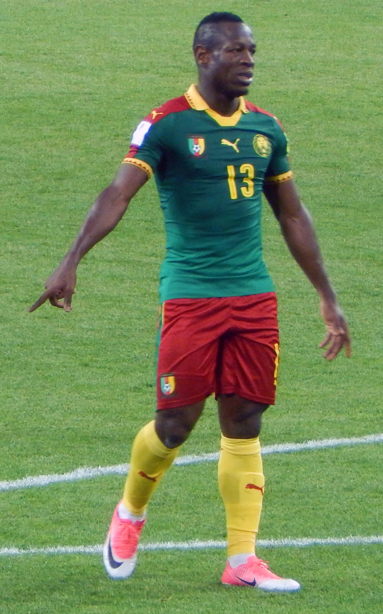 Кристиан Бассогог во время матча против сборной Чили